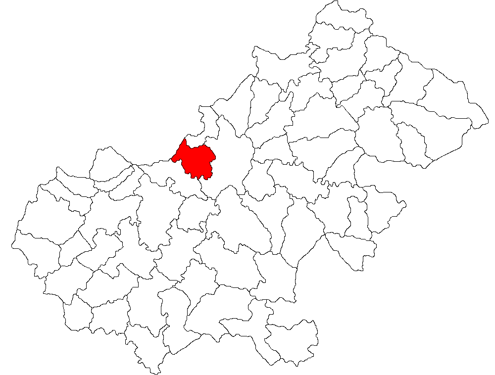 Categorie:Hărţi ale judeţului Satu Mare